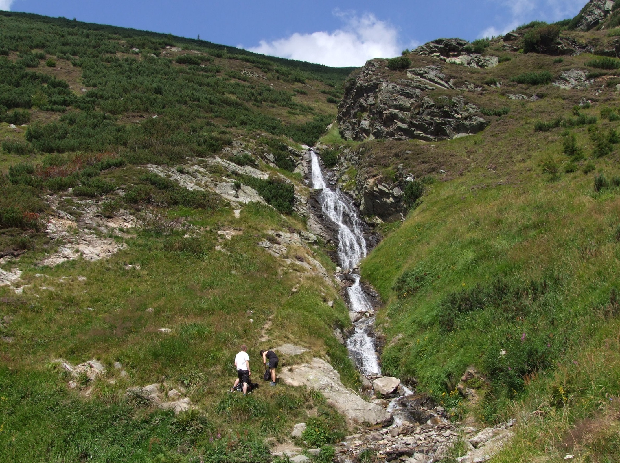 Szarafiowy Wodospad w Dolinie Żarskiej